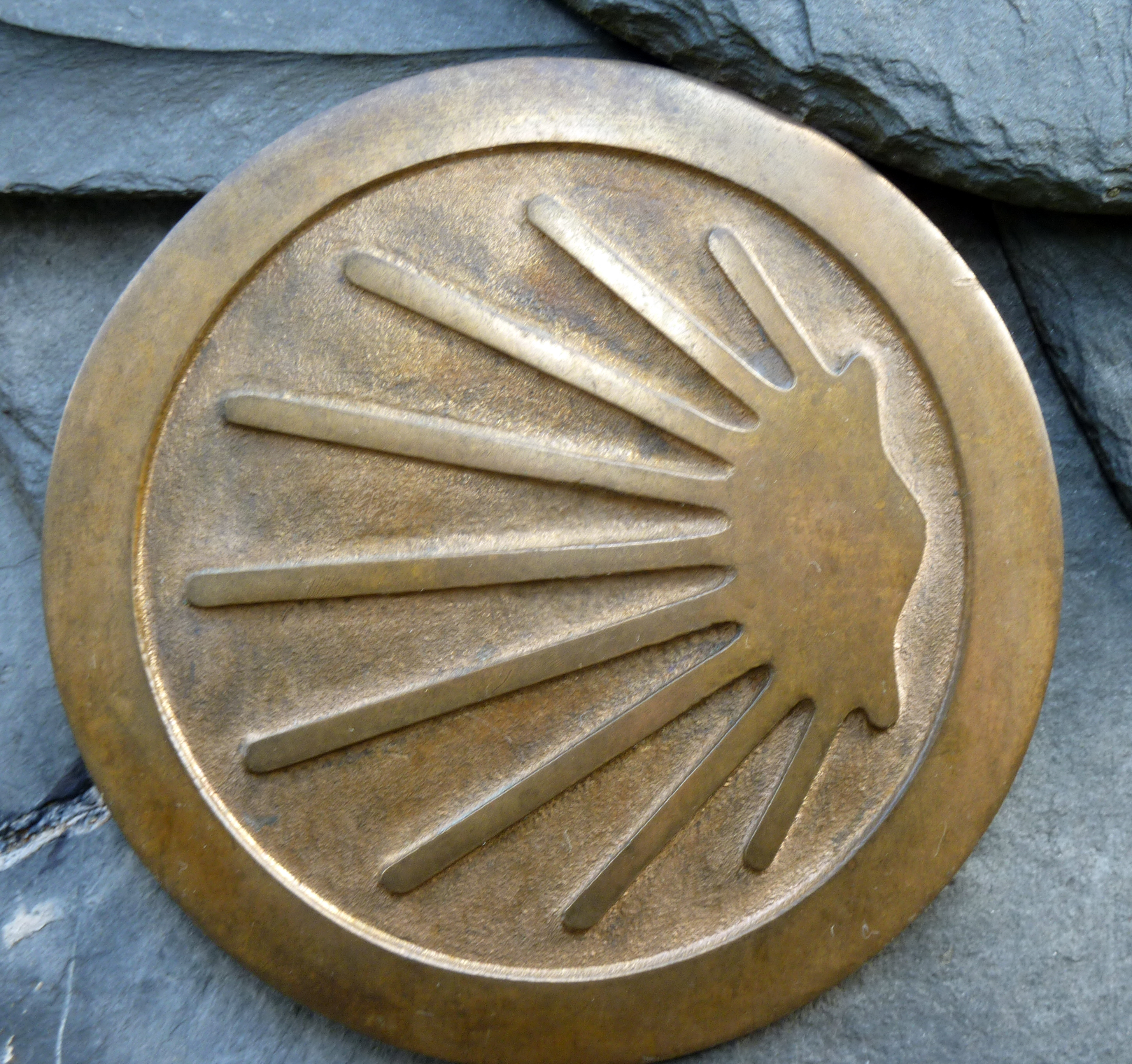 Stilisierte Jakobsmuschel in Lennep, Symbol des Jakobsweges